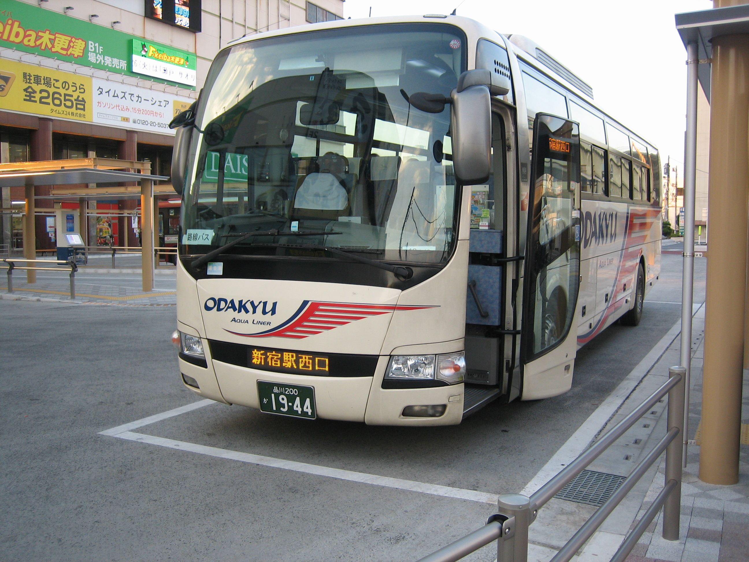 発車を待つ新宿行の高速バス